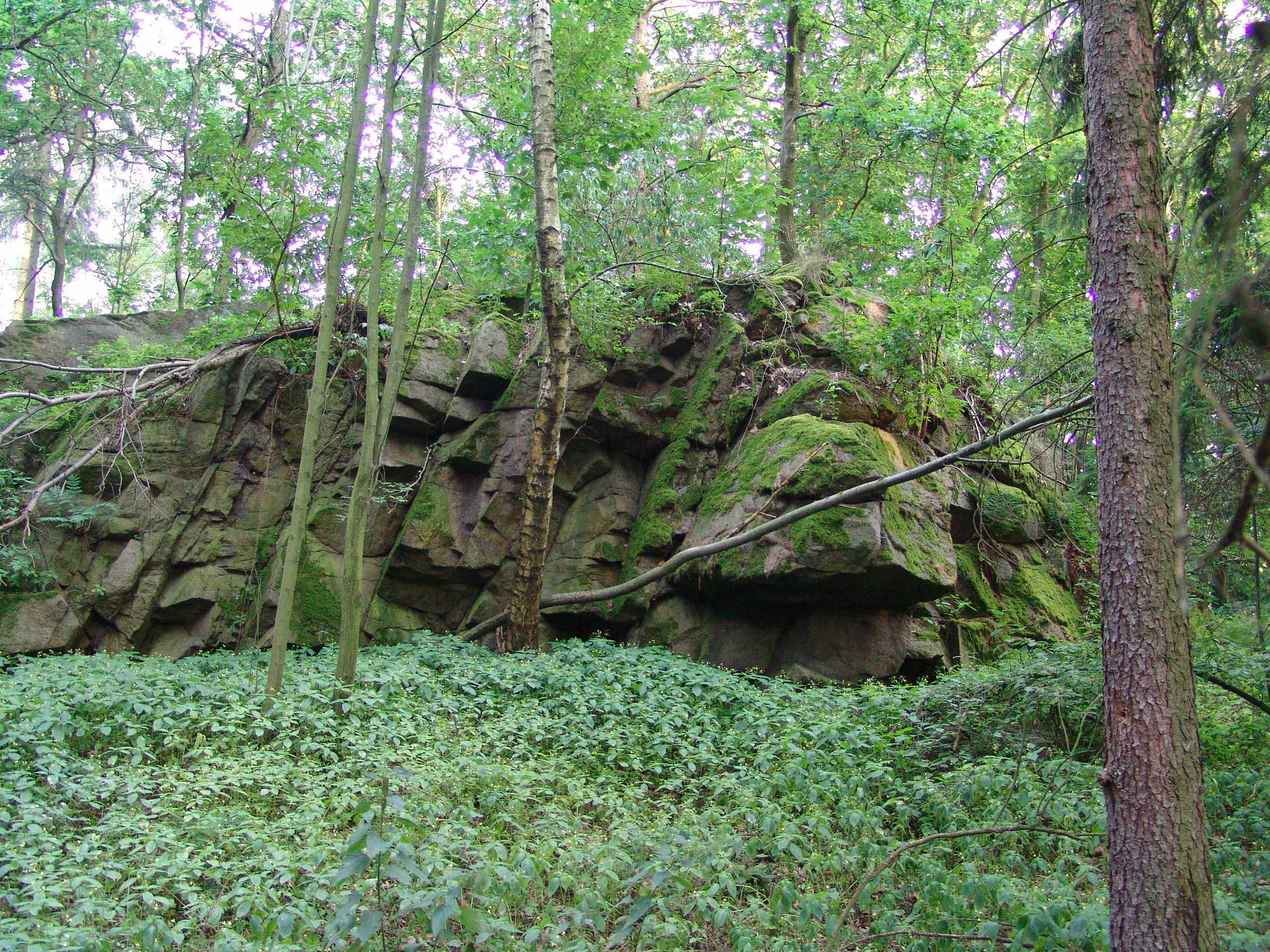 Dürrhennersdorfer Hutberg